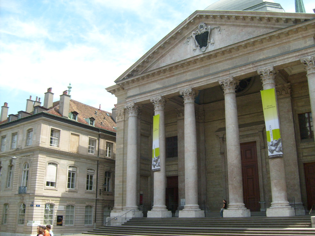 Parvis de la cathédrale Saint-Pierre de Genève; les colonnes sont ornées de l'étendard des célébrations Calvin 2009